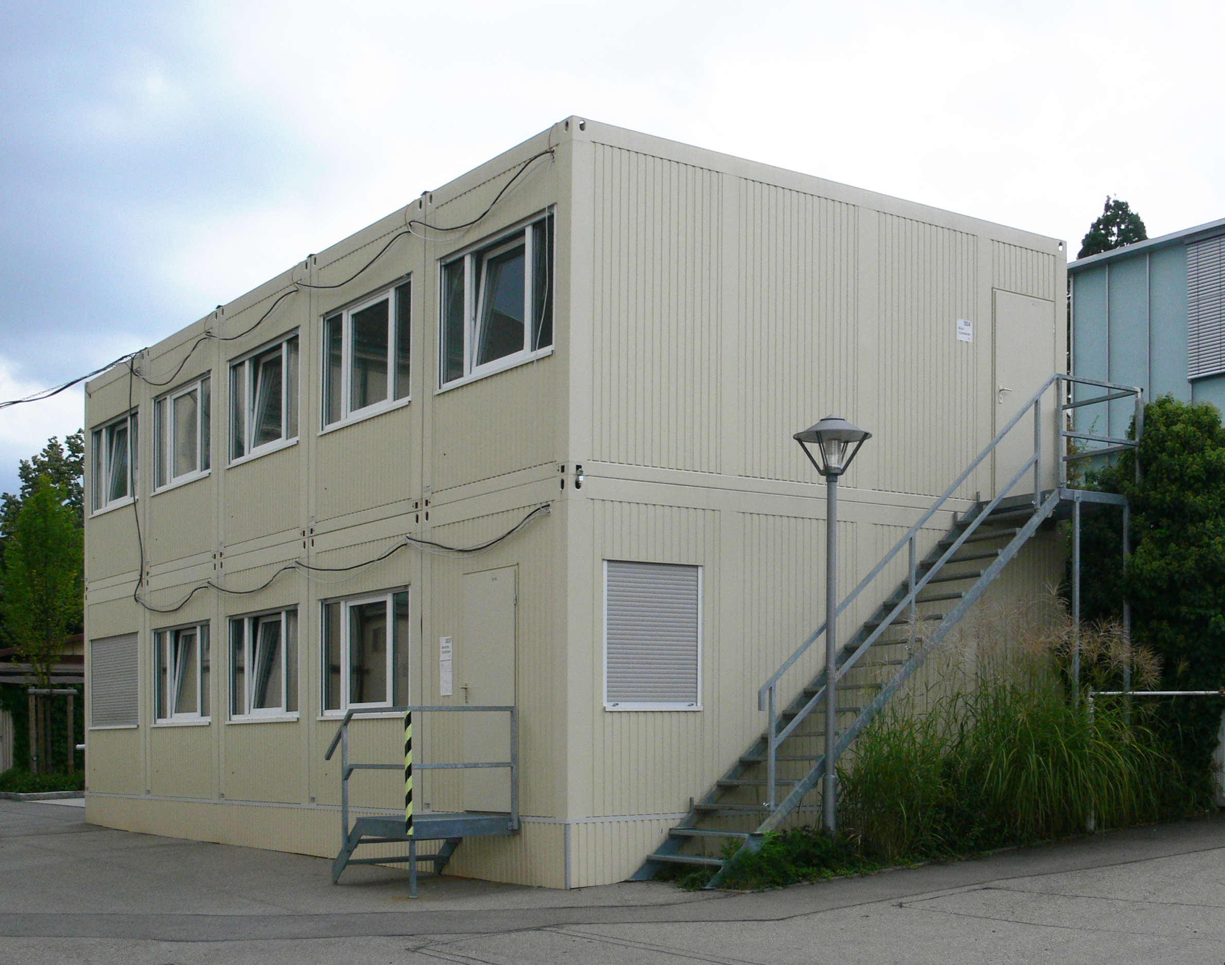 Ravensburg, Seminarcontainer der Berufsakademie in der Weinbergstraße